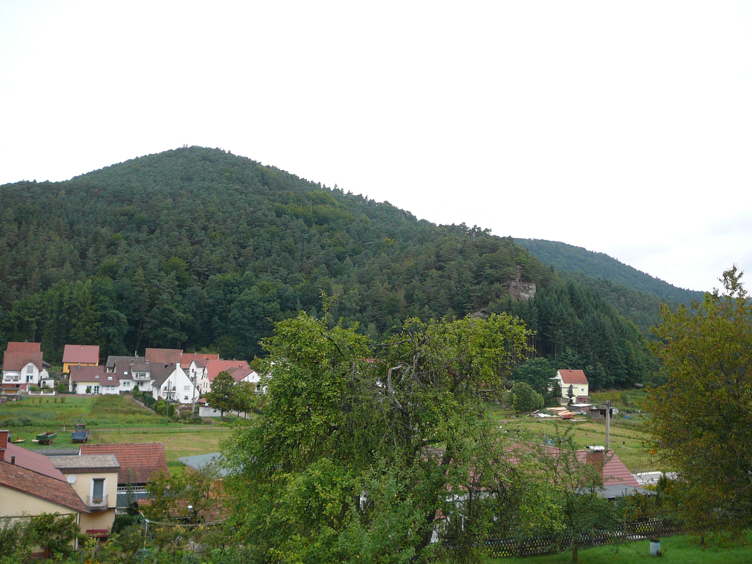 Göckelberg bei Wilgartswiesen: Blick vom Bahnhof auf seine Südseite.